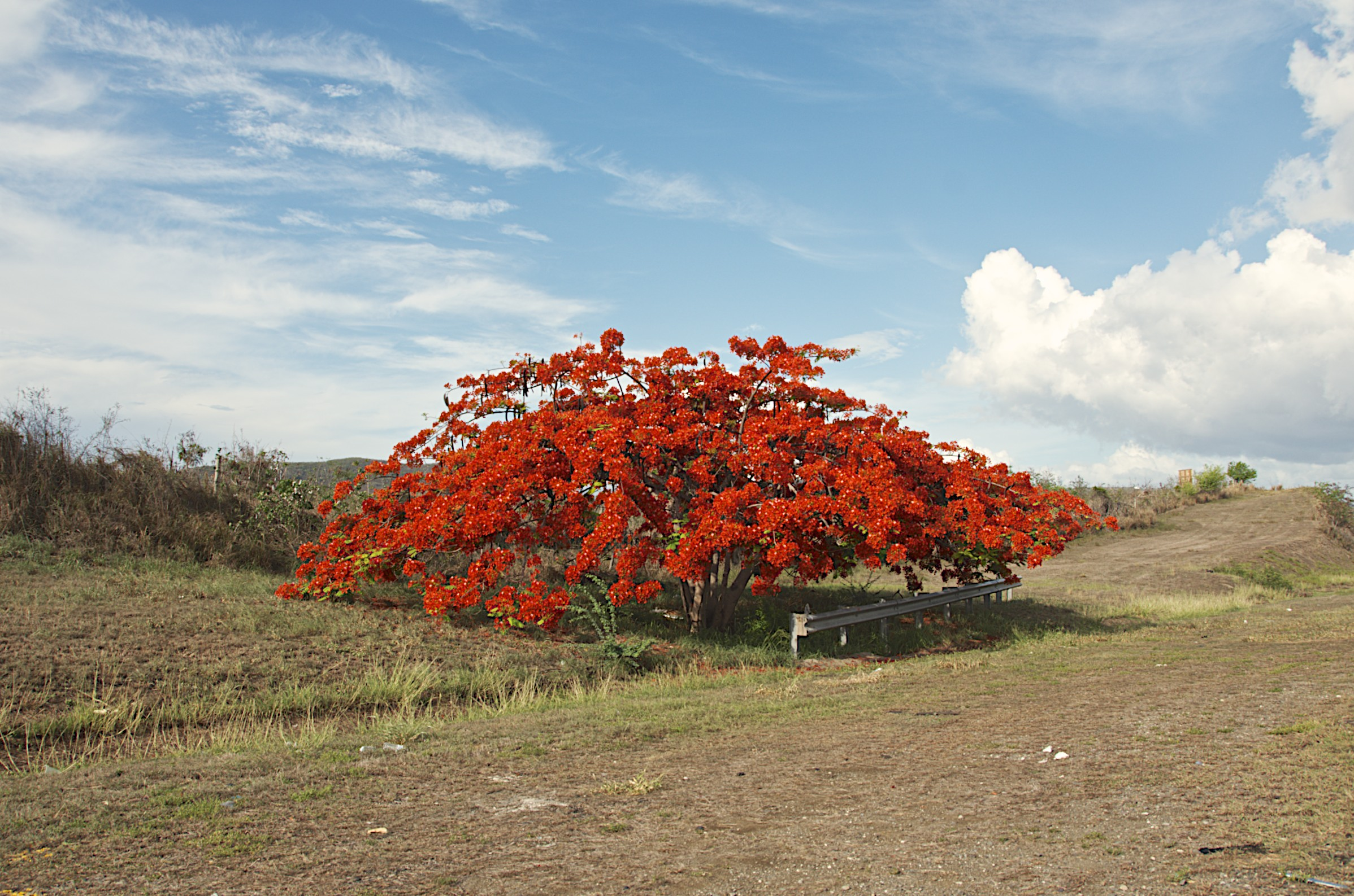 Flamboyan tree, Juana Diaz, PR